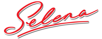 Logo de la pelicula Selena